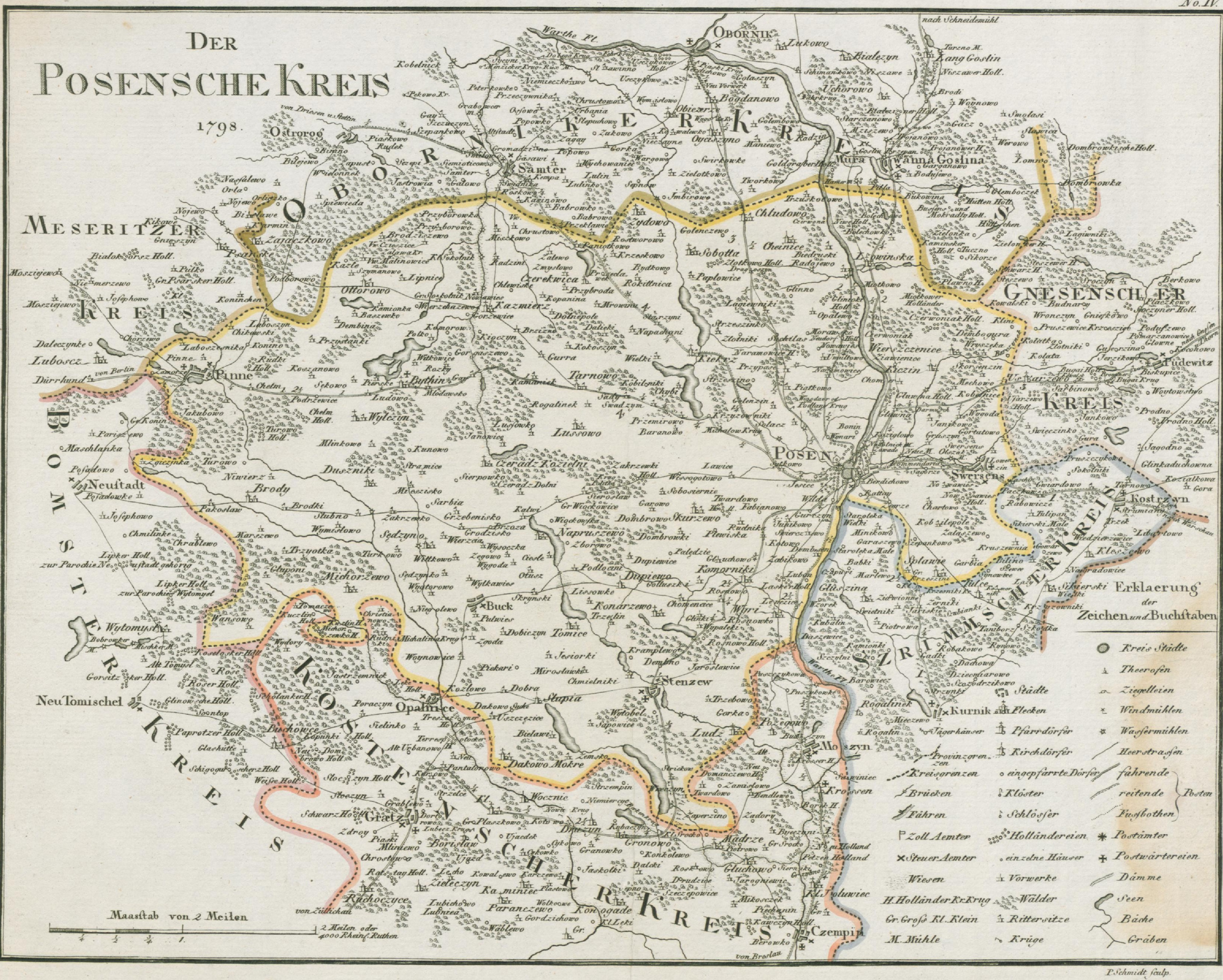 Map of "Kreis Posen" as of 1798